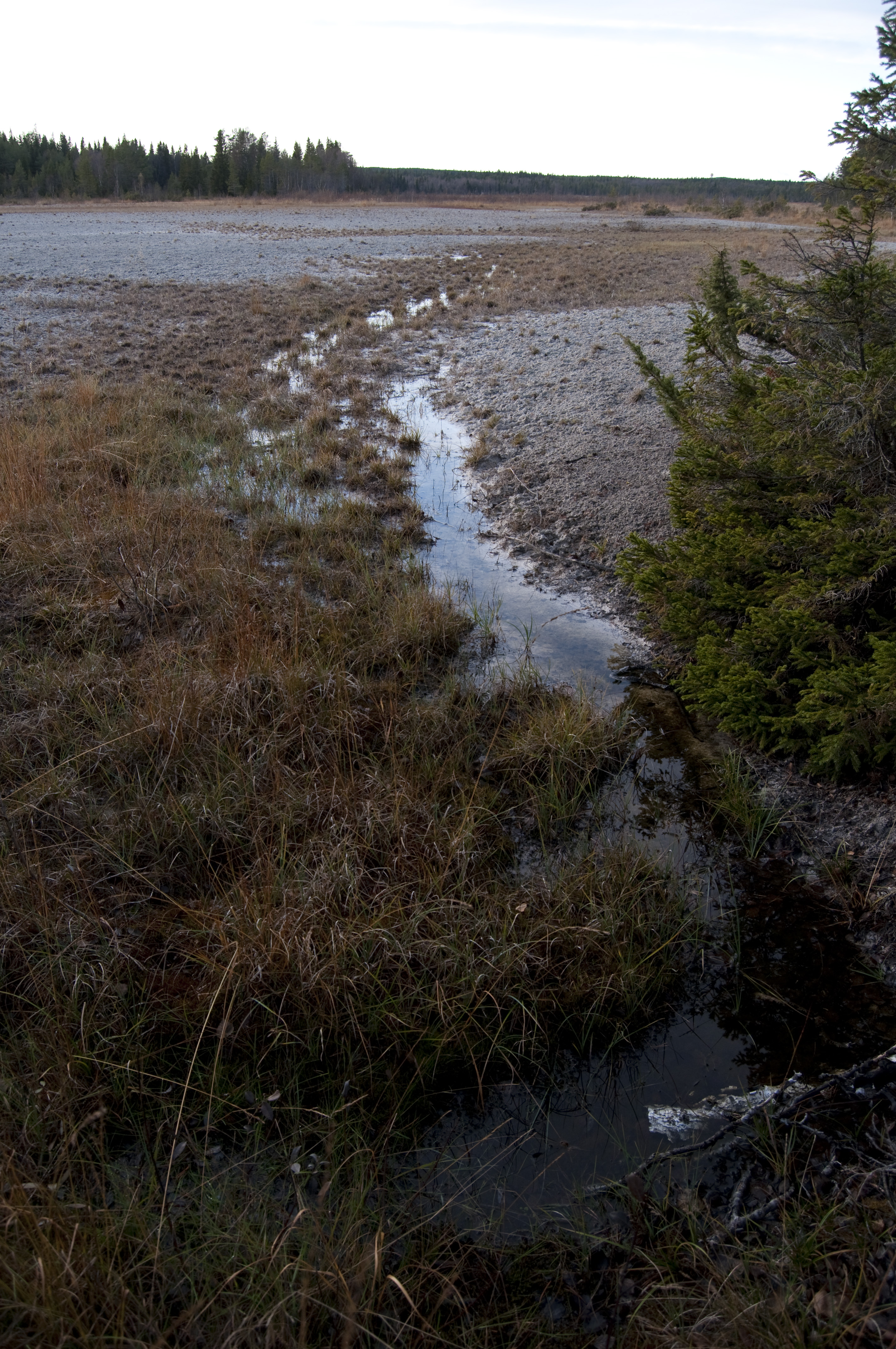 Tysjöarnas fågelskyddsområde utanför Östersund, Jämtland, Sweden.